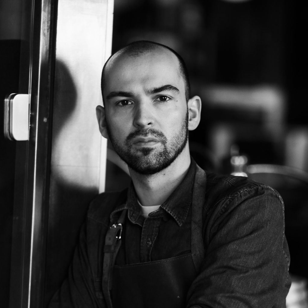 Porträt von Robert Rädel